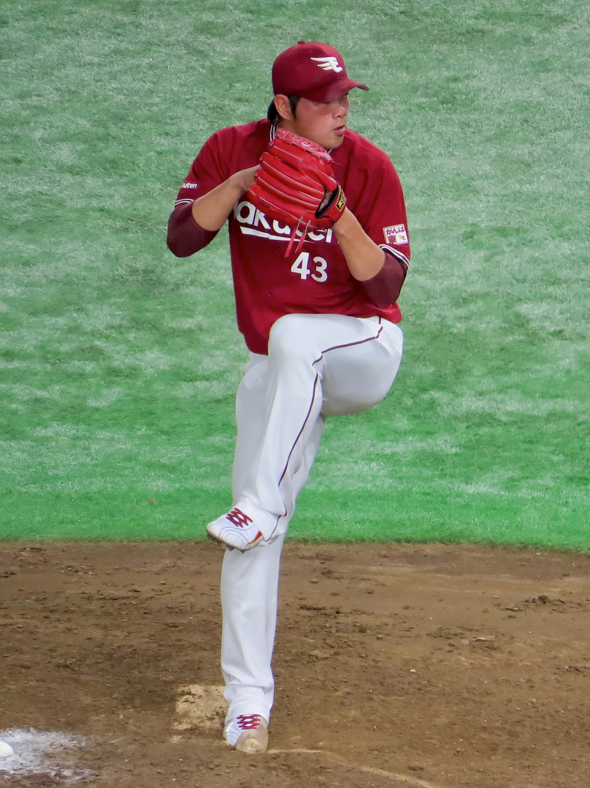 東北楽天ゴールデンイーグルスの選手。東京ドームにて。